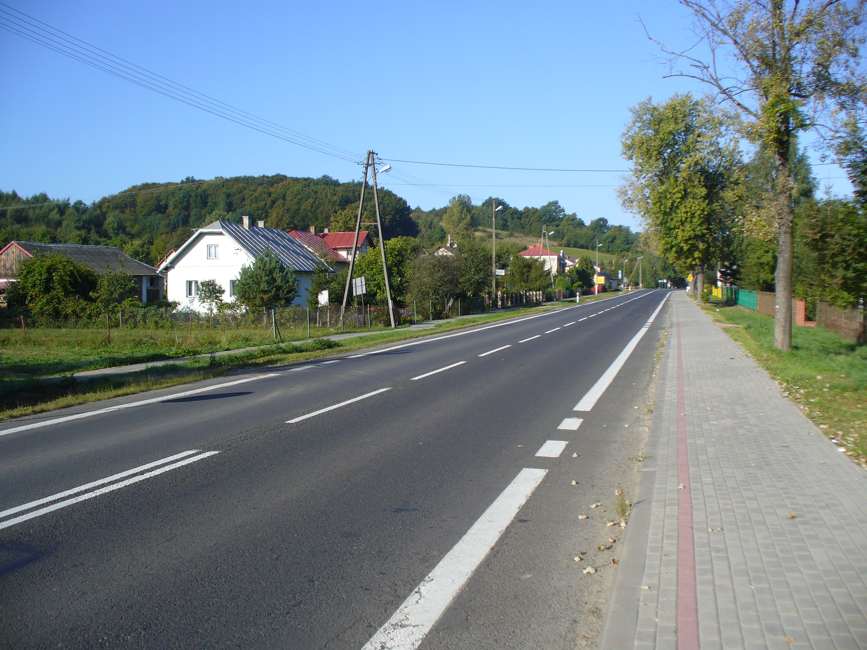 Besko - ul. Bieszczadzka